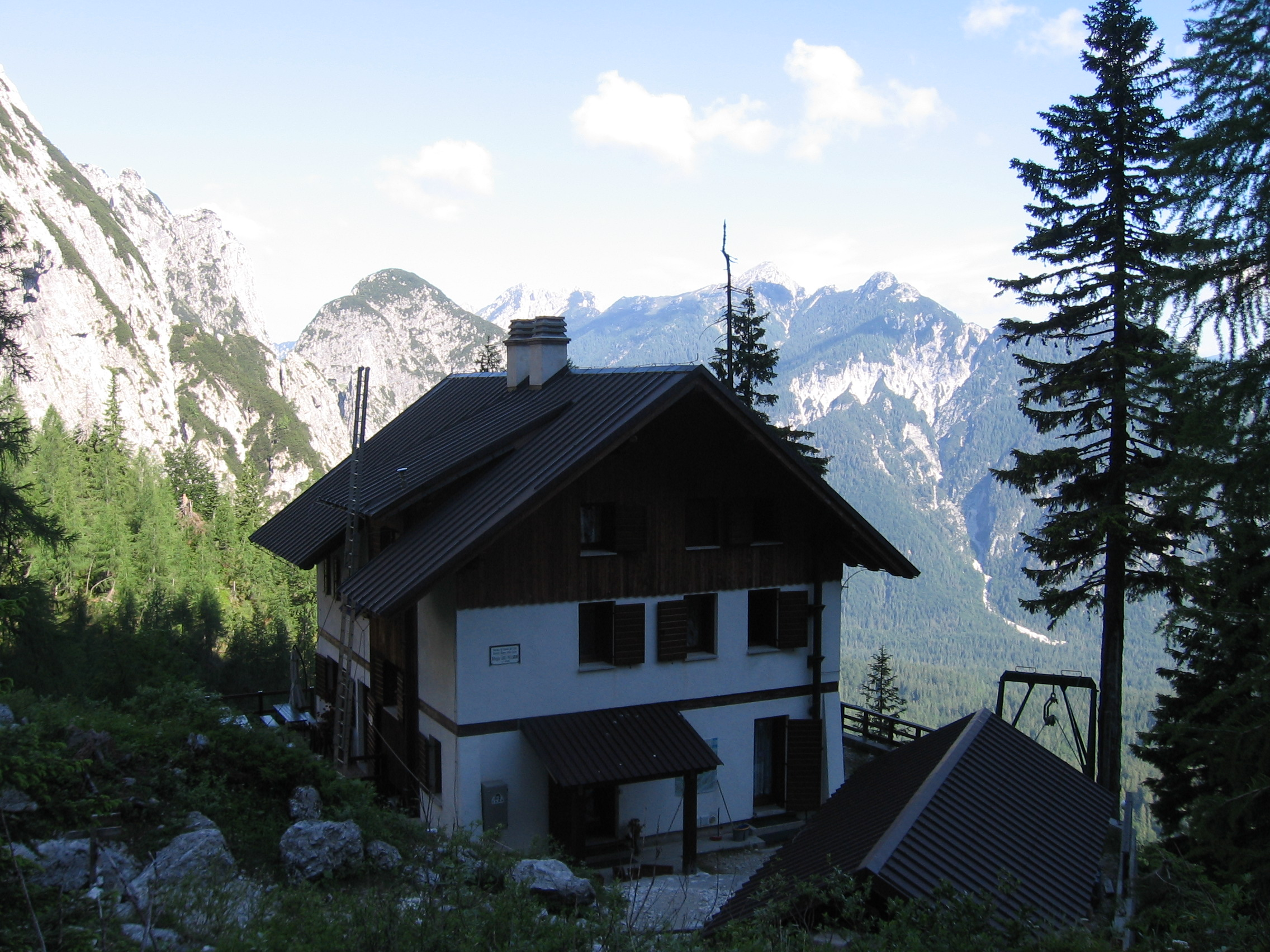 Alpine hut Rifugio Luigi Pellarini, Julian Alps, Italy.